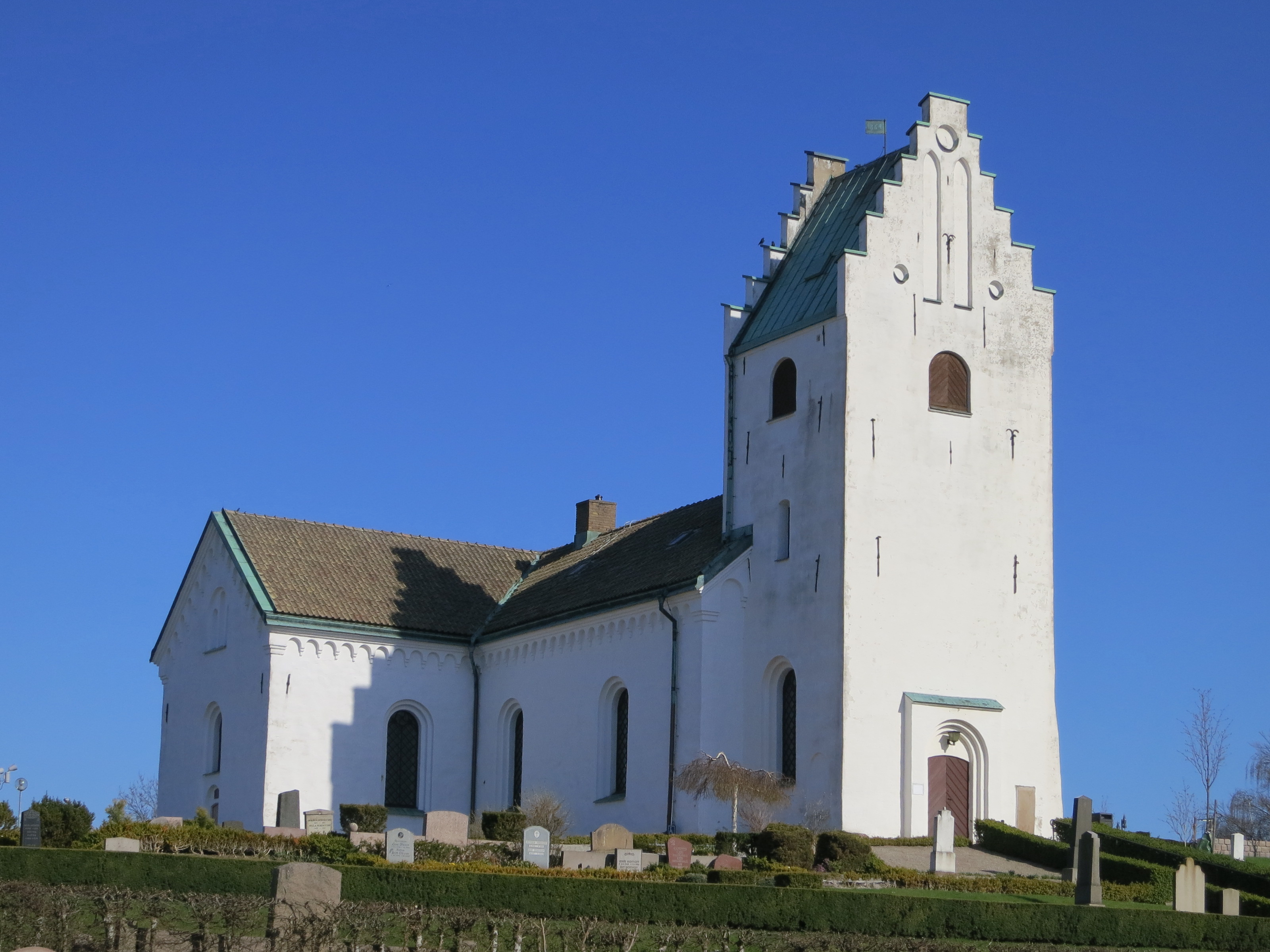 Husie kyrka i Malmö